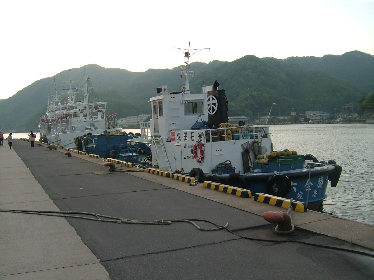 堀田石油給油船、鳥取県境港市、